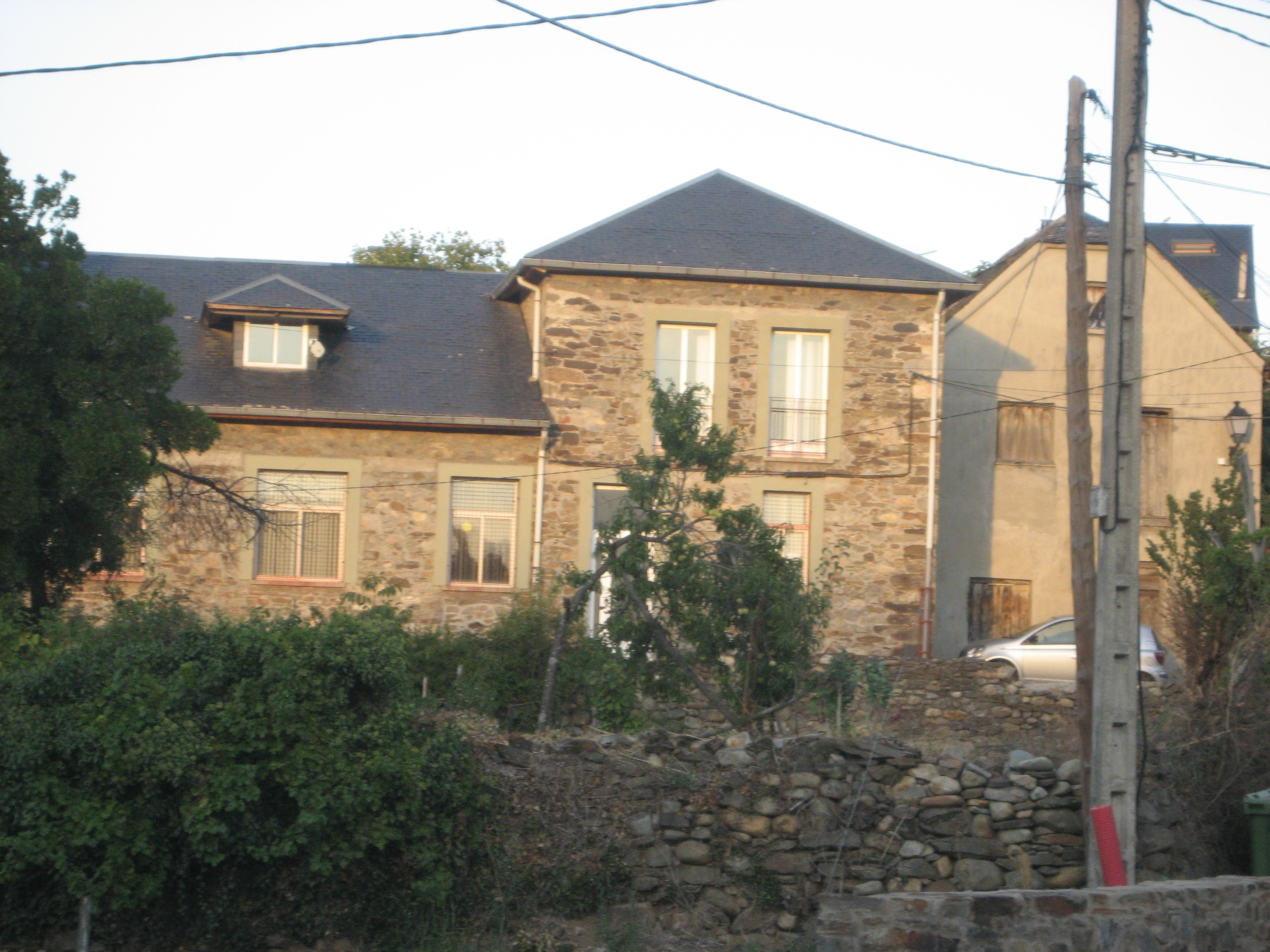 Vista del Colegio de Albares de la Ribera (Torre del Bierzo).